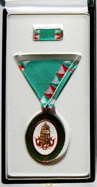 Szolgálati Érdemjel bronz fokozata